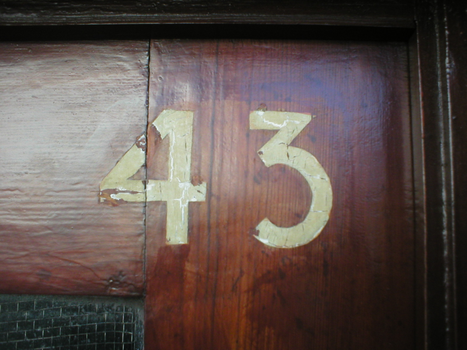 Gebäudetypographie (Hausnummer) an einem Haus in der Bruchfeldstraße